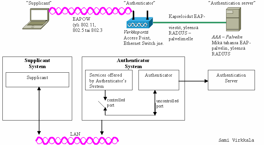 Kuvan nimi:IEEE 802.1x toiminnallisuuden komponentit. Kuvan tekijänoikeudet omistaa: Sami Virkkala